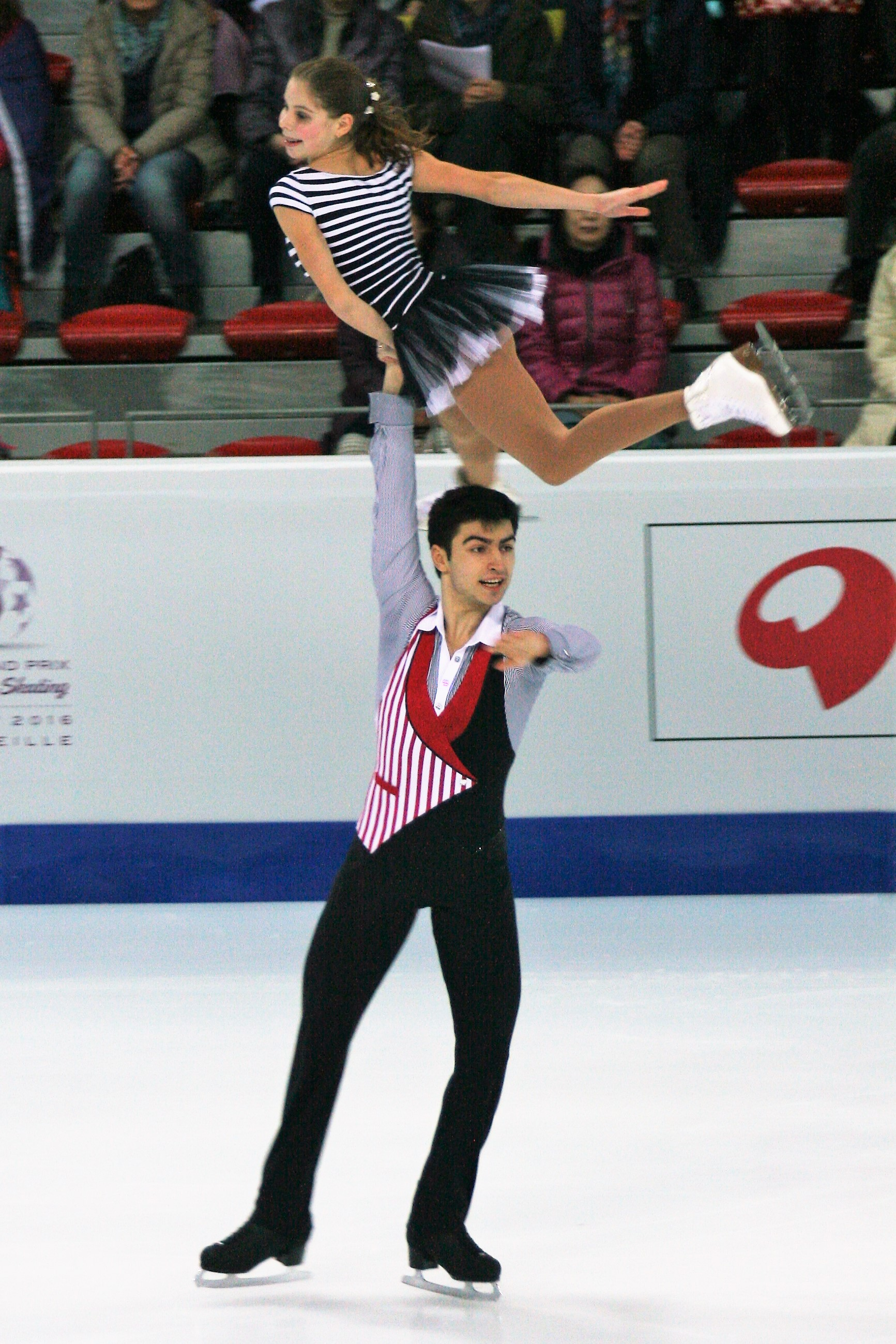 Анастасия Мишина / Владислав Мирзоев (Россия) на финале Гран-при по фигурному катанию среди юниоров 2016-2017